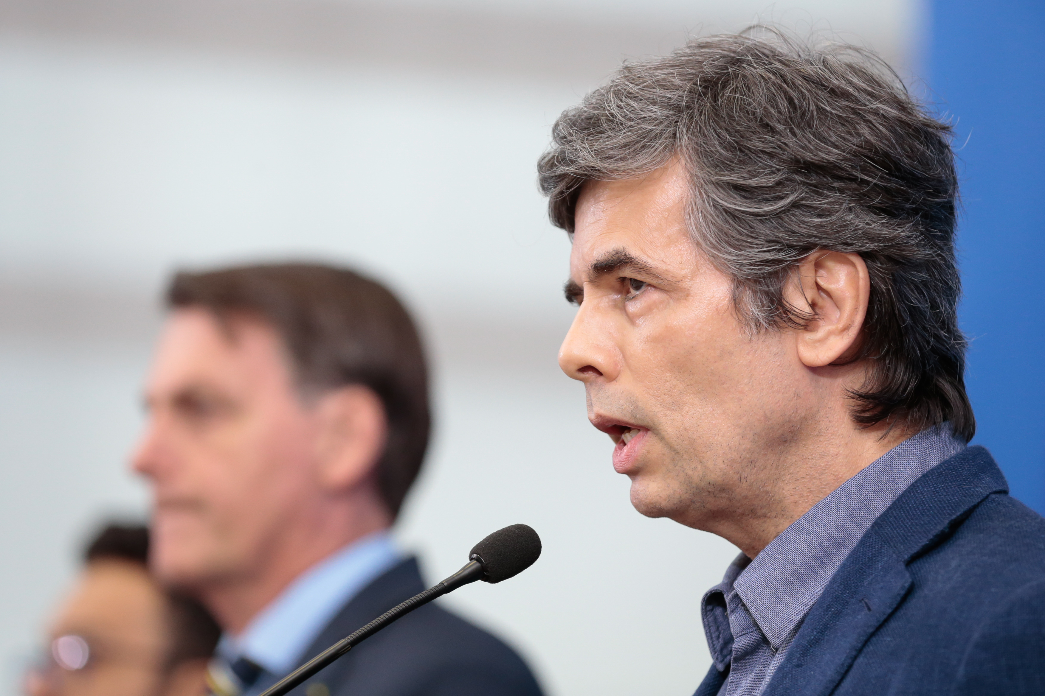 (Brasília - DF, 16/04/2020) Palavras do Oncologista, Nelson Teich. Foto: Carolina Antunes/PR